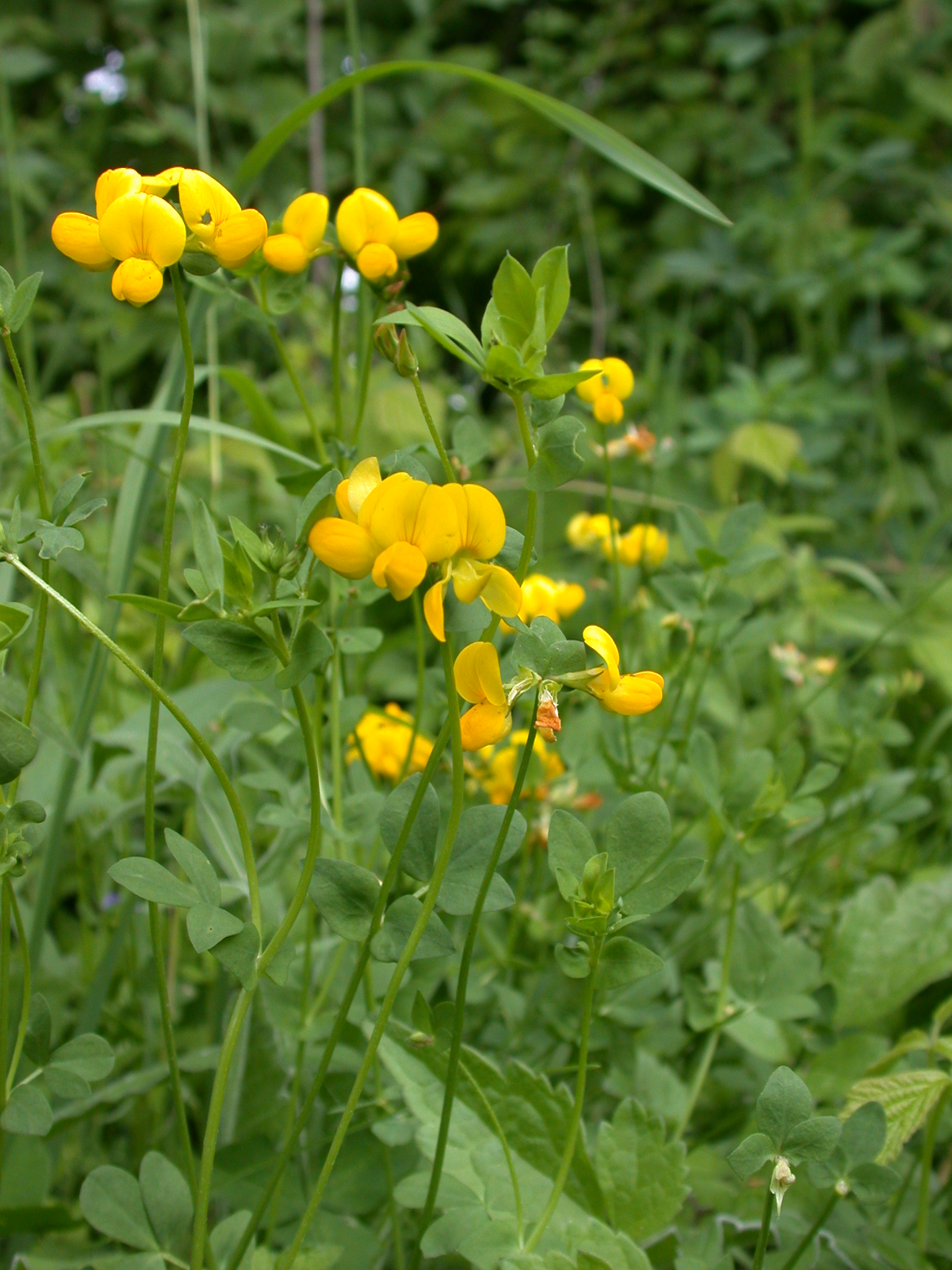 Lotus corniculatus Chauvoncourt (Meuse), France